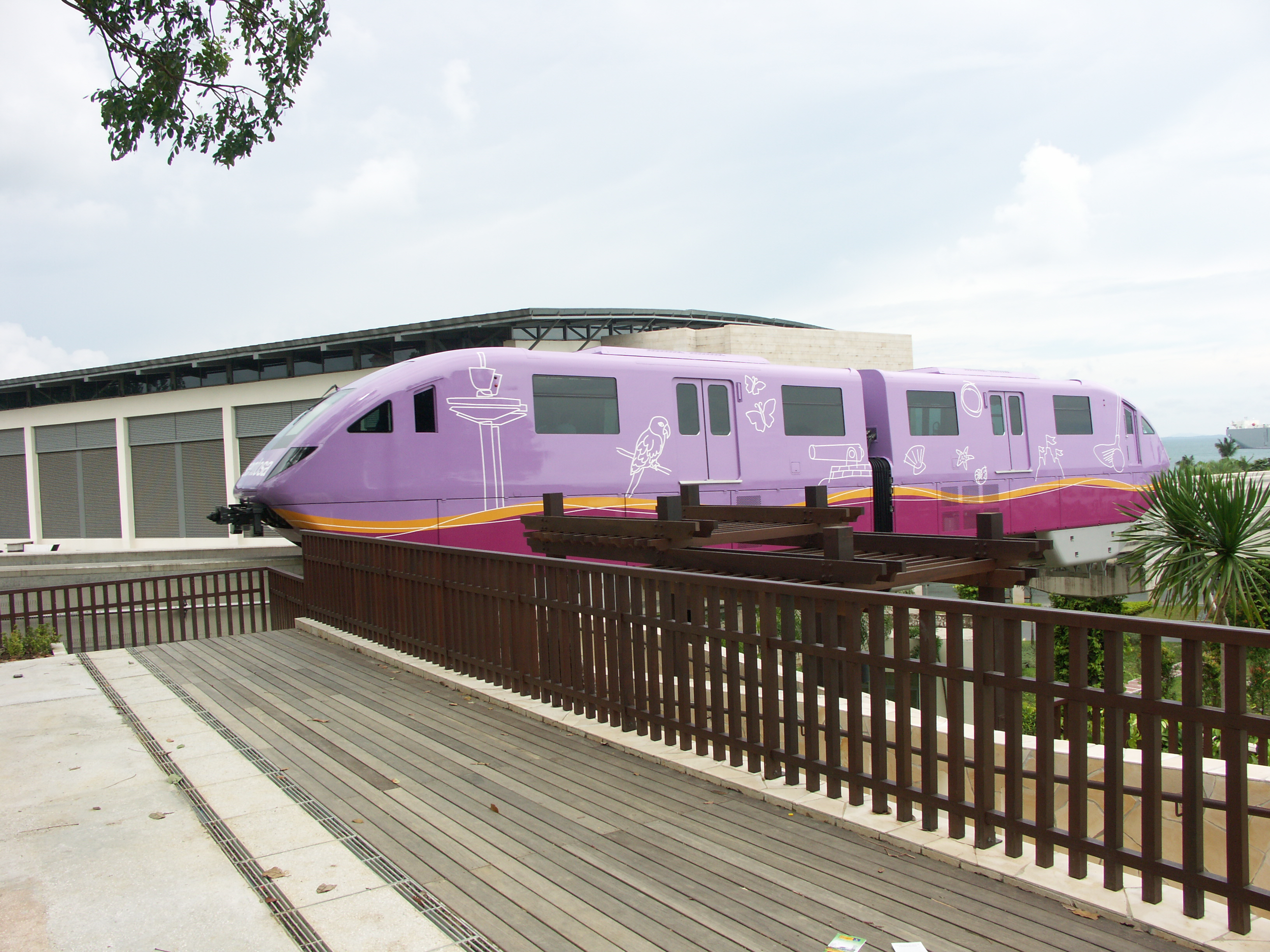 セントーサ・エクスプレス シンガポール セントーサ島のモノレール 「Beach」駅付近で撮影